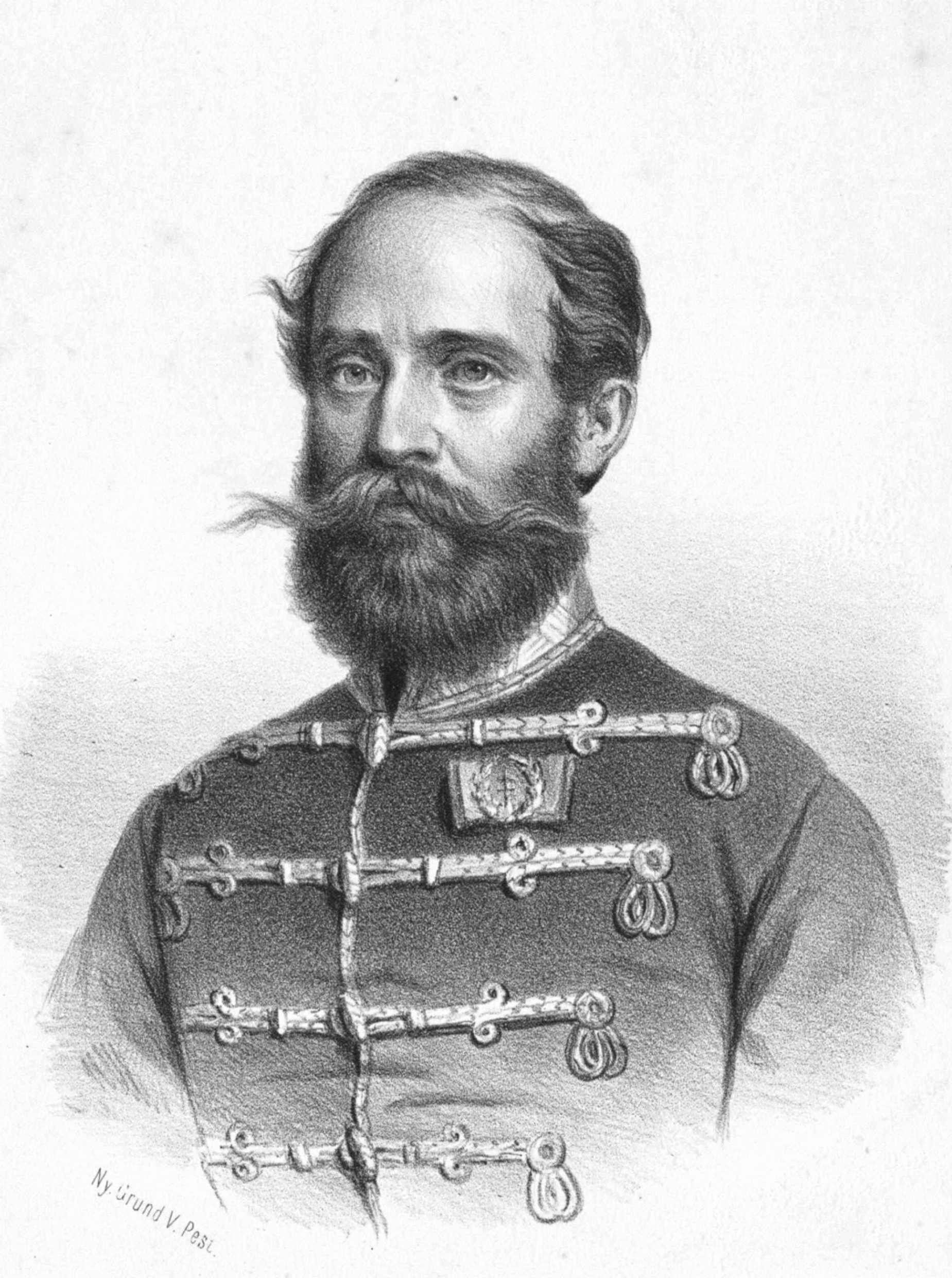 Dessewffy Arisztid honvéd vezérőrnagy, aradi vértanú (litográfia)